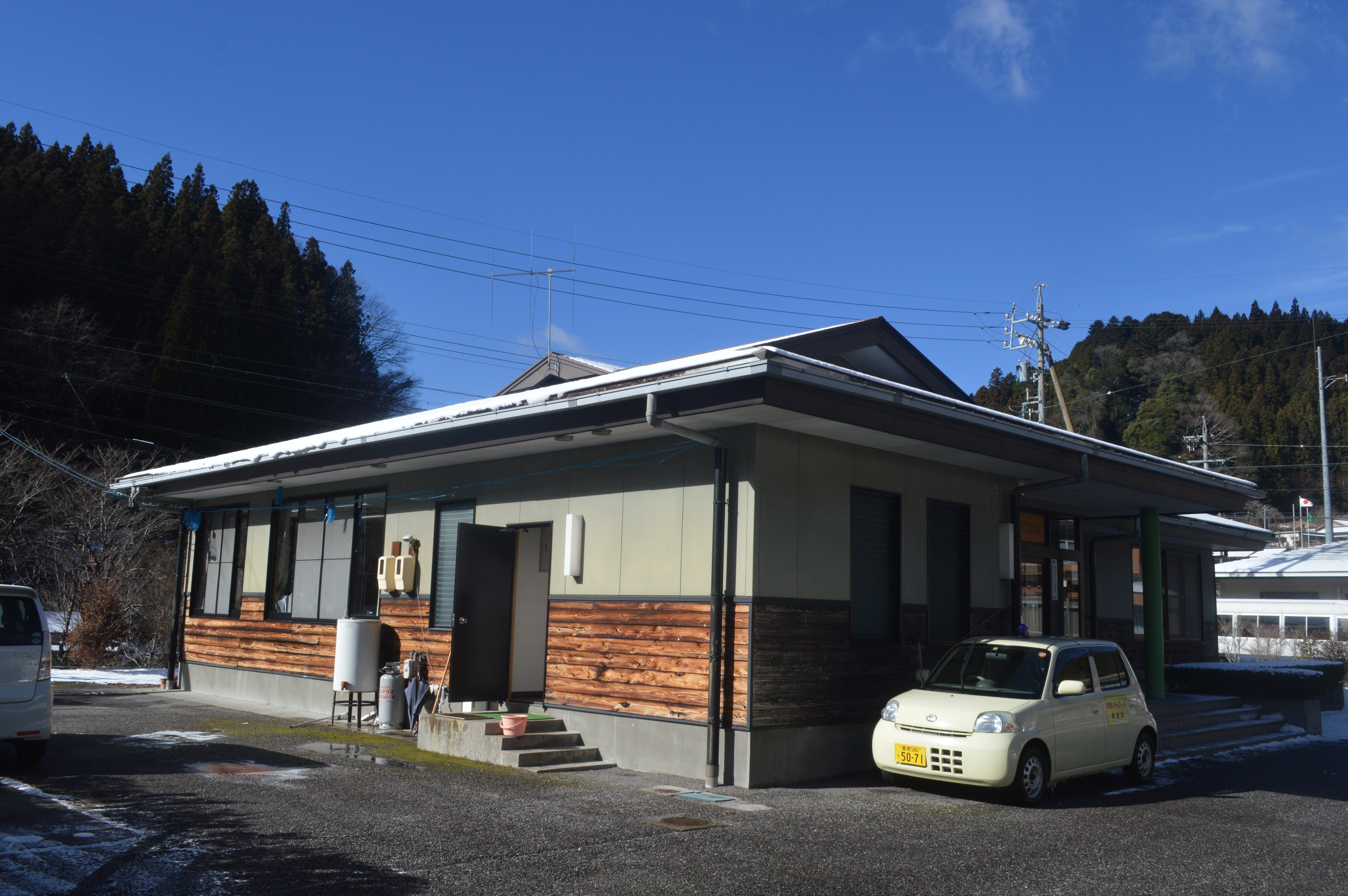 愛知県北設楽郡豊根村の豊根村商工会館。